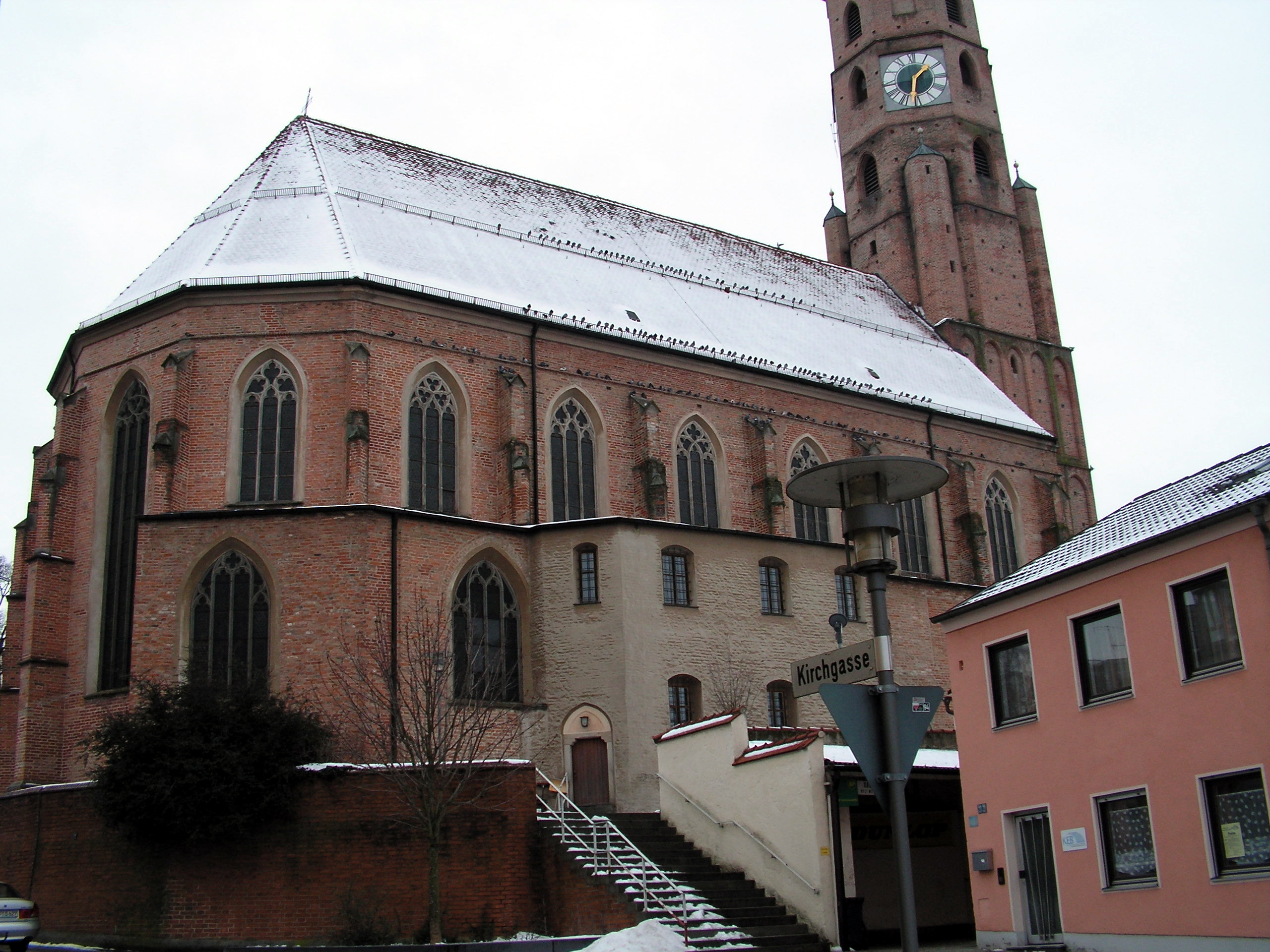 St. Johannes (Dingolfing) von Norden